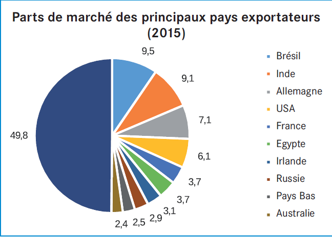 Echanges Commerciaux en Arabie saoudite